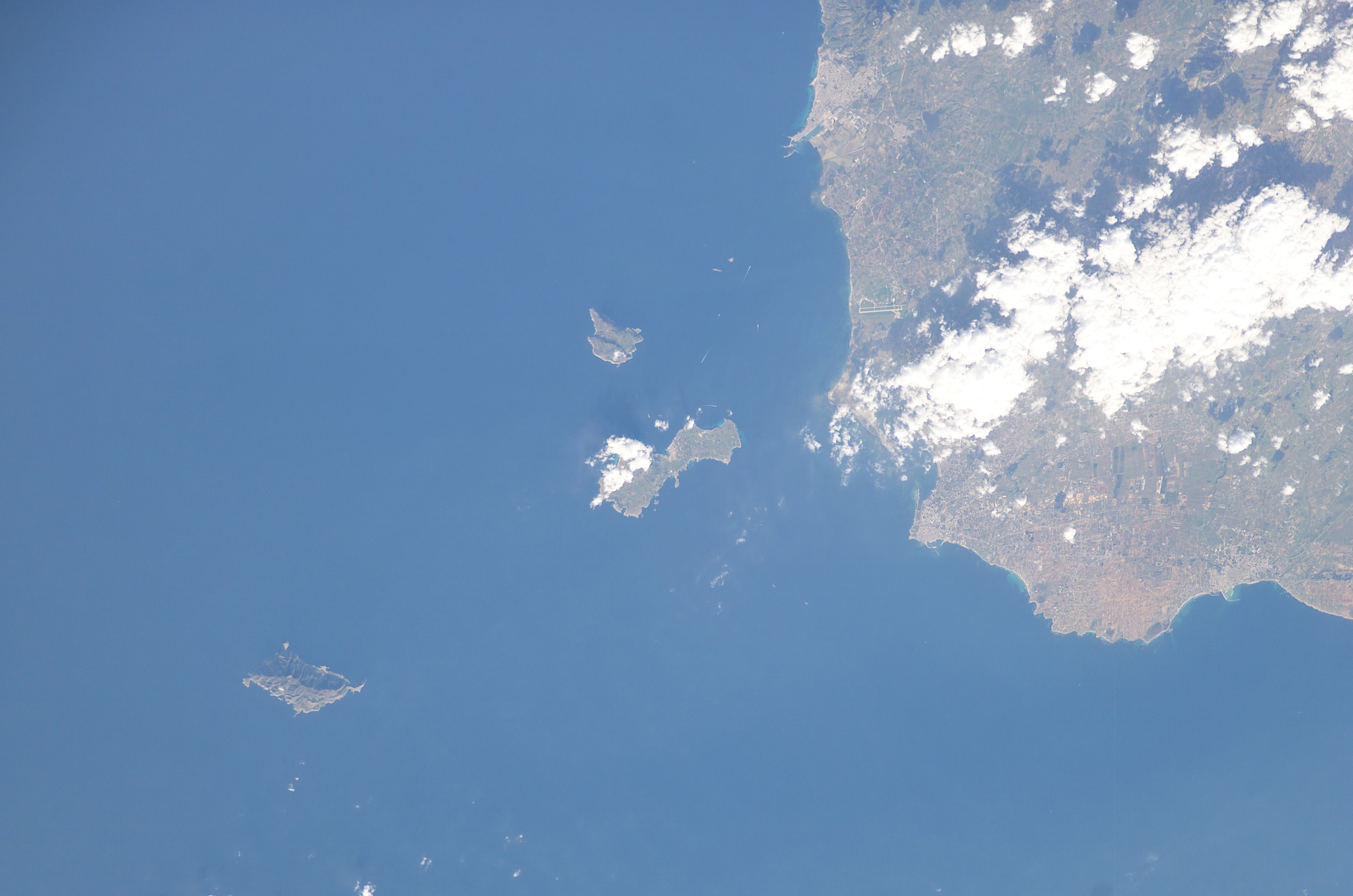 Procedencia: Trapani, islas de Marettimo, Favignana y Levanzo, y Marsala (provincia de Trapani)